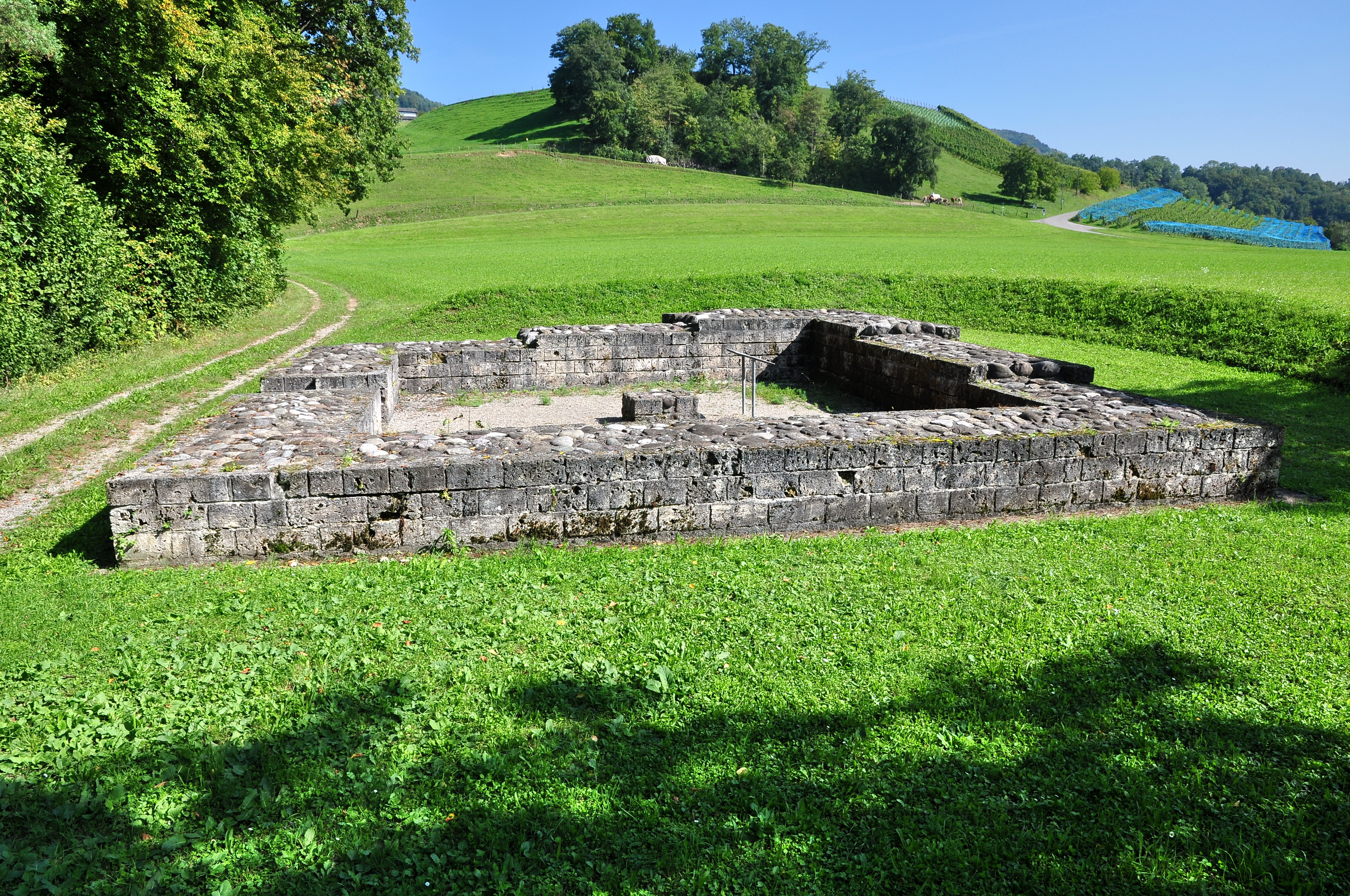 Tössegg-Schlössliacker, Teil der spätrömischen Rheinbefestigung in Freienstein-Teufen (Switzerland)